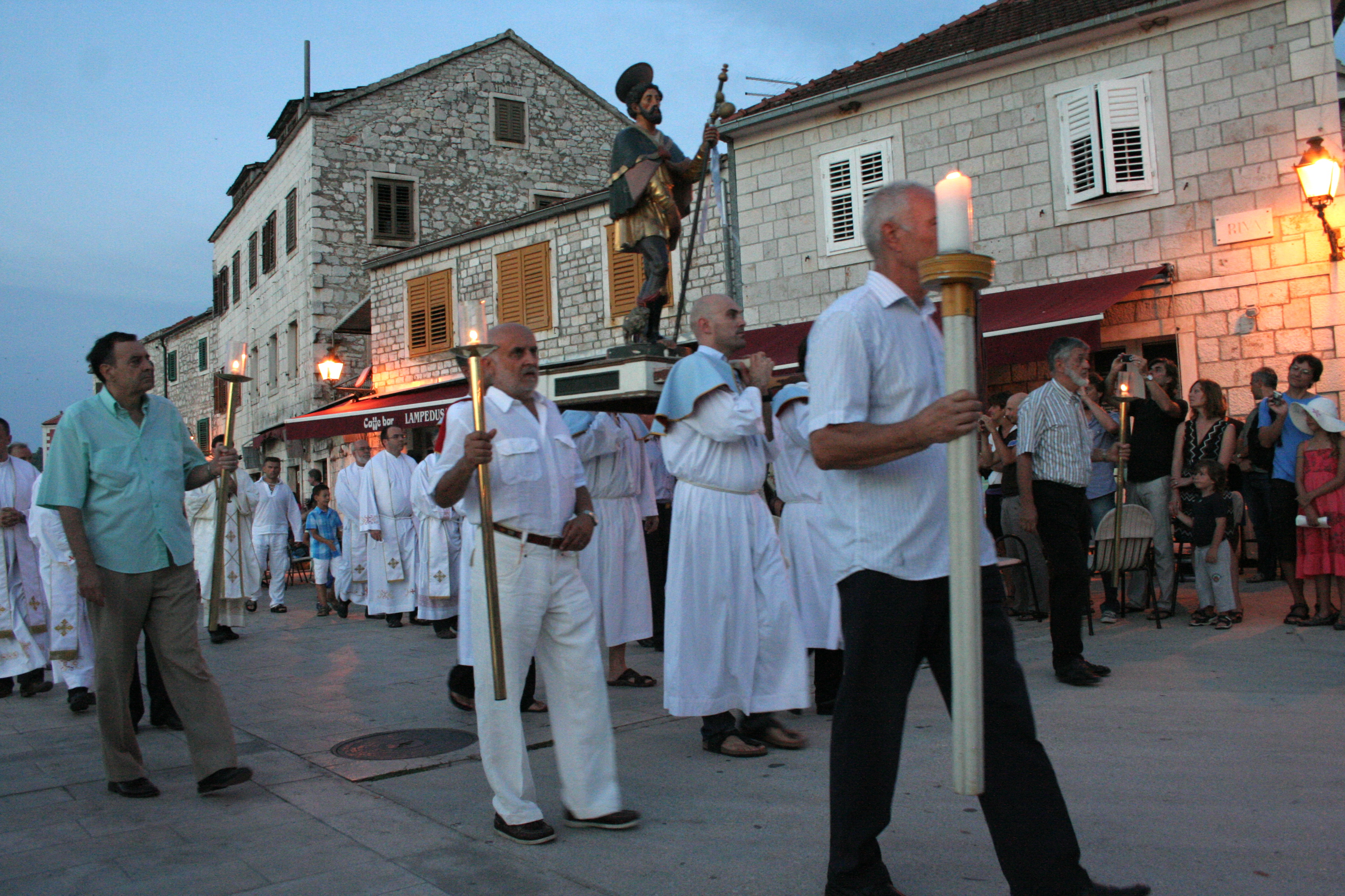 Procesija na blagdan sv. Roka u Starom Gradu